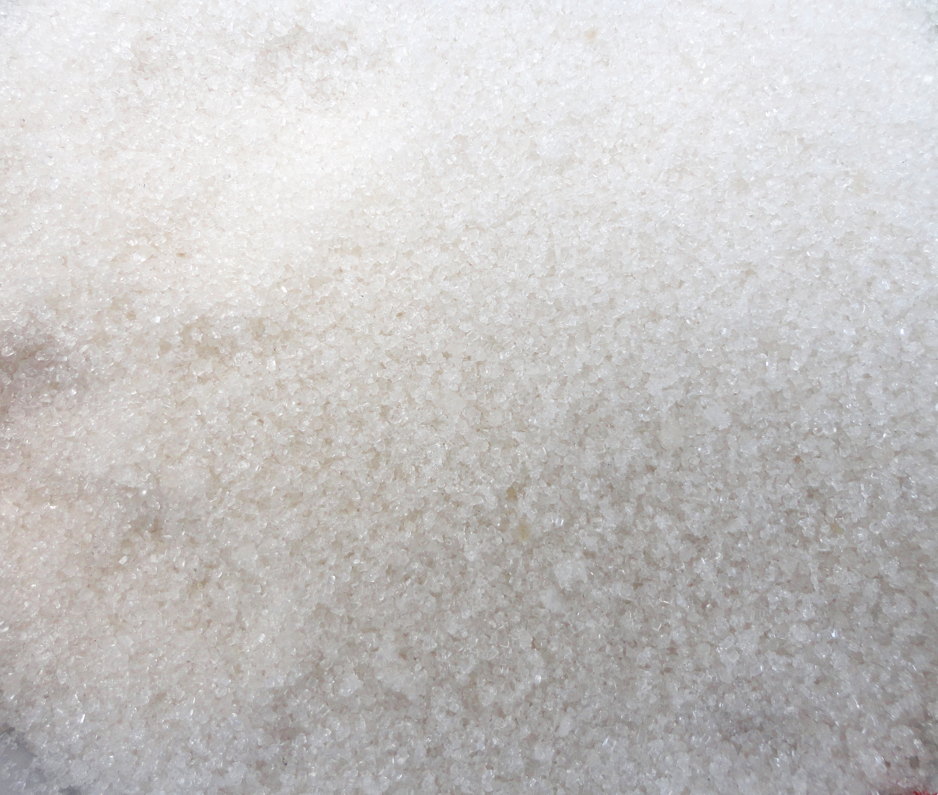 Azucar Blanca Refinada